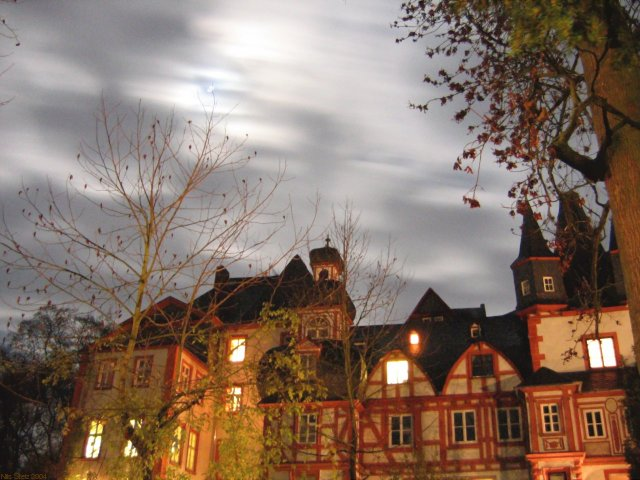 Schloss Hungen am 23.11.2004